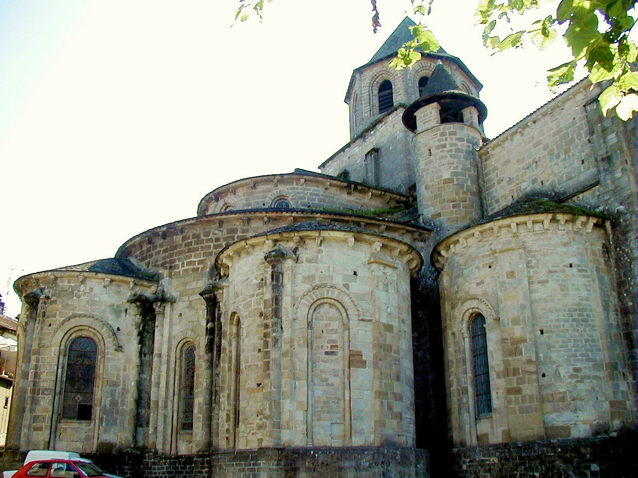 Beaulieu-sur-Dordogne - Abbatiale Saint-Pierre - Chevet